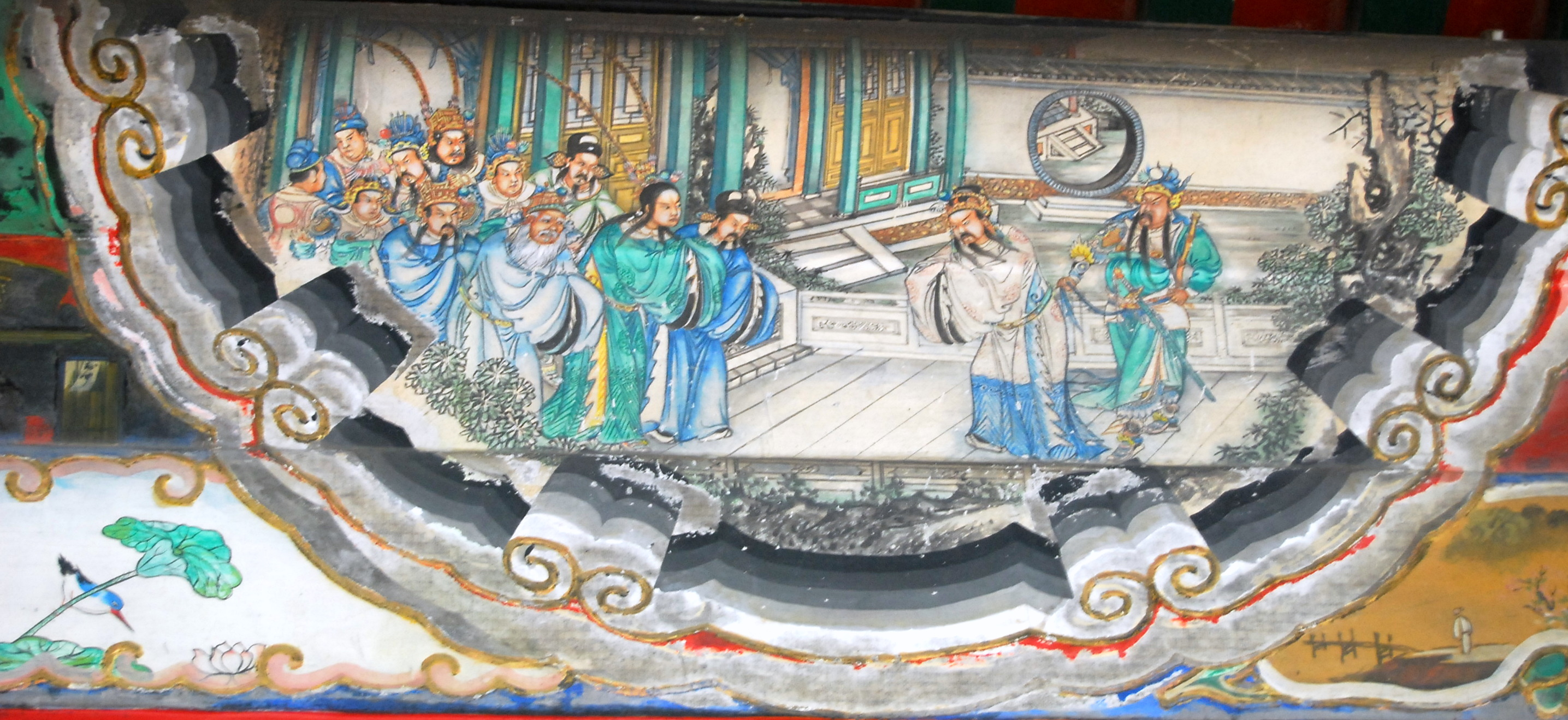 颐和园长廊上的彩绘：三国演义故事：江东赴会